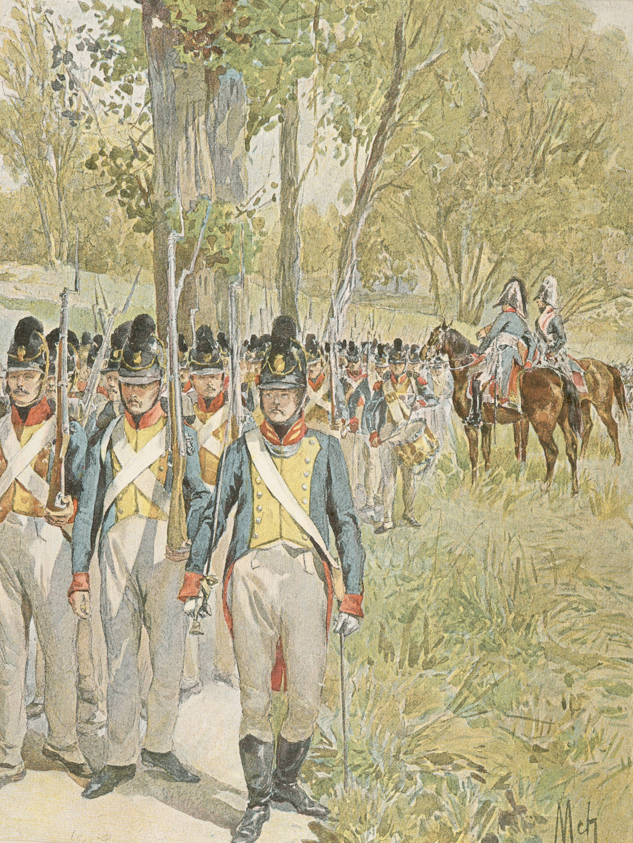 Le 4e régiment d'infanterie bavarois en marche en 1809.